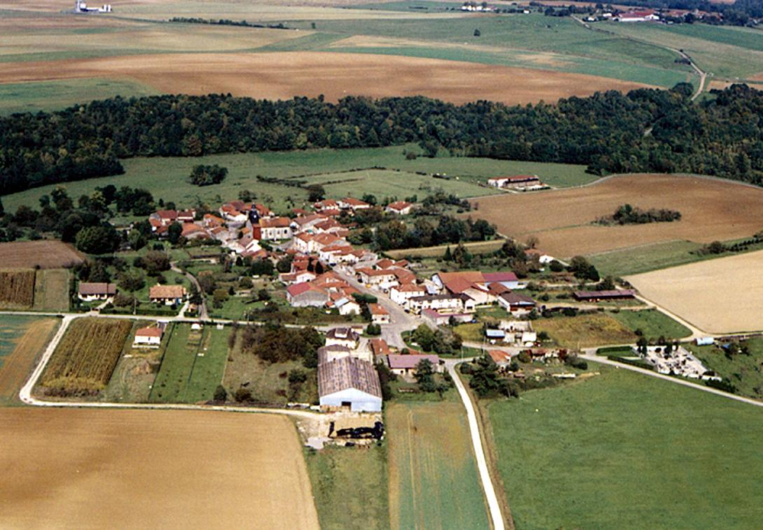 Domblain